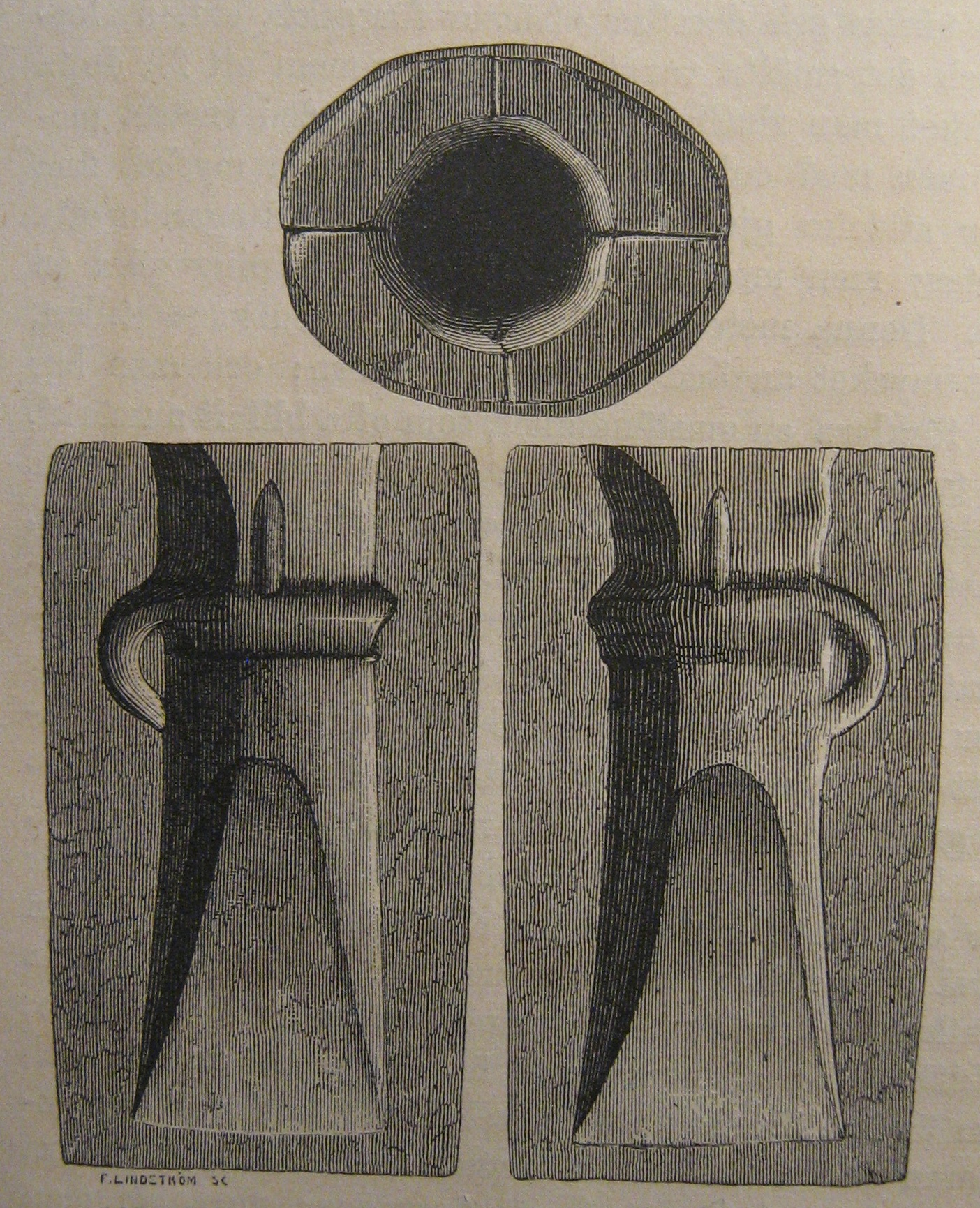 Gjutform av sten för holkyxa, fynd från Skåne